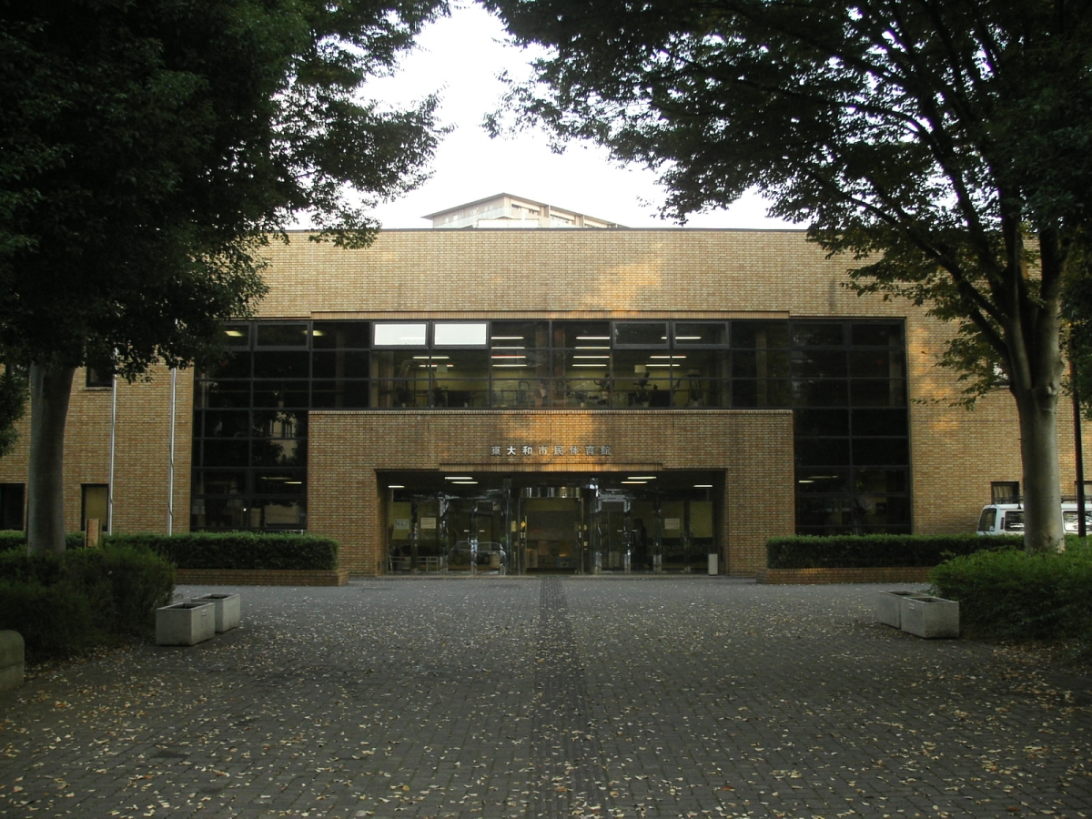 Higashiyamato citizen gymnasium 東大和市民体育館 東京都東大和市桜が丘